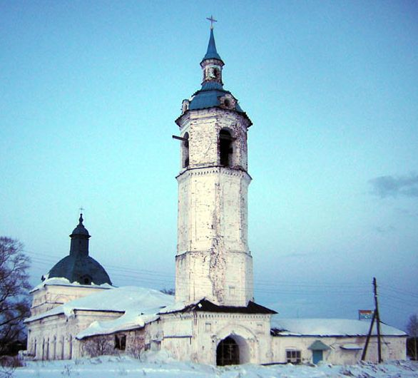 Церковь Знамения села Пасегово